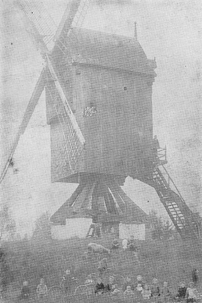 Molen van Strijtem